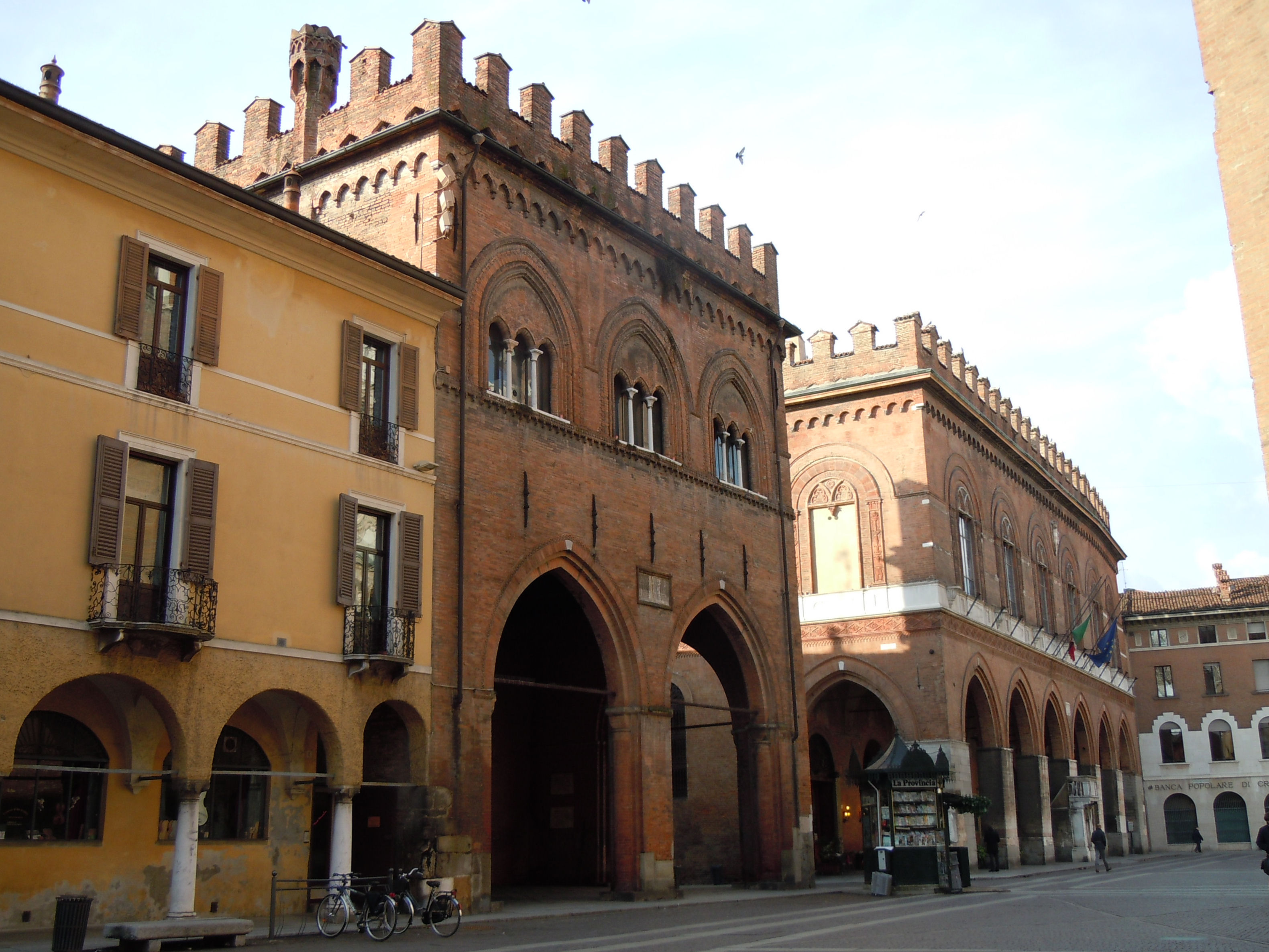 Cremona, piazza del Comune.